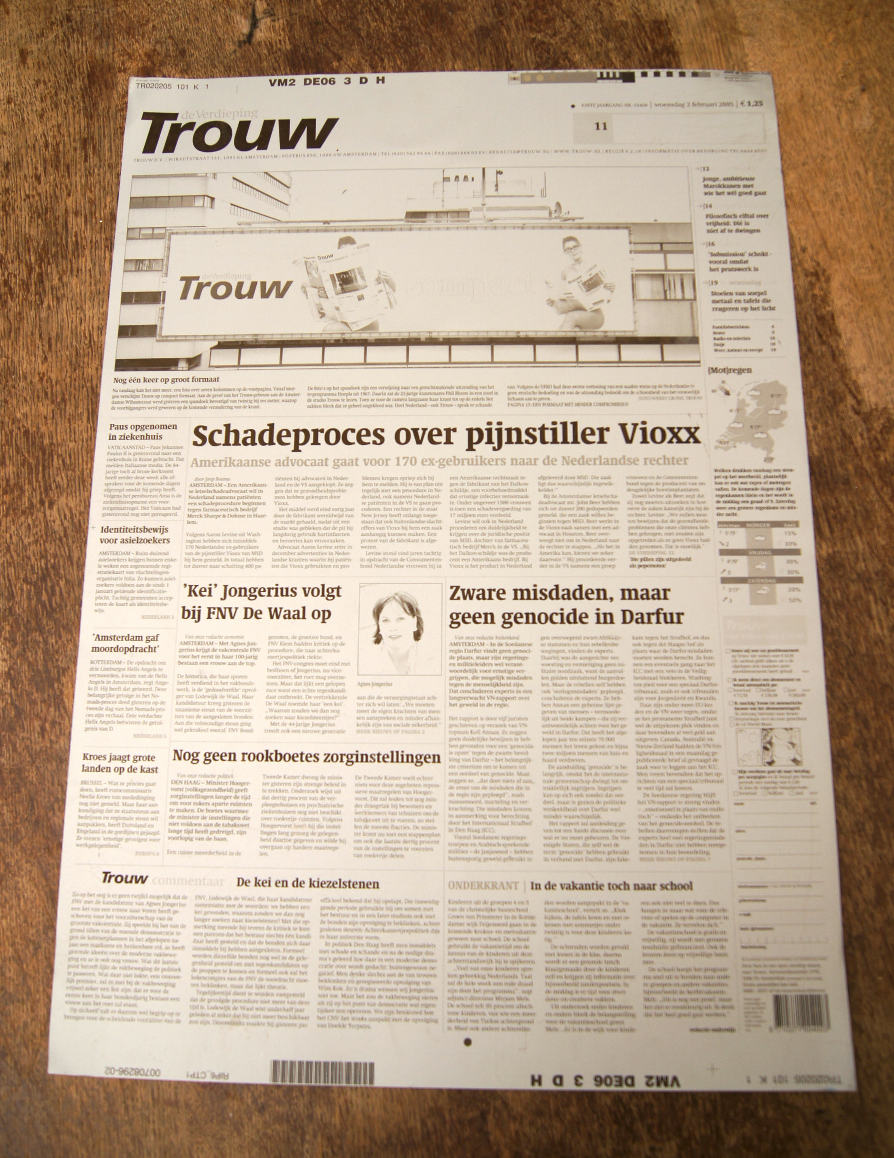 Aluminium drukplaat van dagblad Trouw op broadsheet-formaat. Het is de laatste voorpagina (2 februari 2005) op groot formaat, dus net voordat de krant overging op tabloid-formaat. De foto en het bijschrift verwijzen daar ook naar; het is de laatste voorpagina-foto over zeven kolommen.